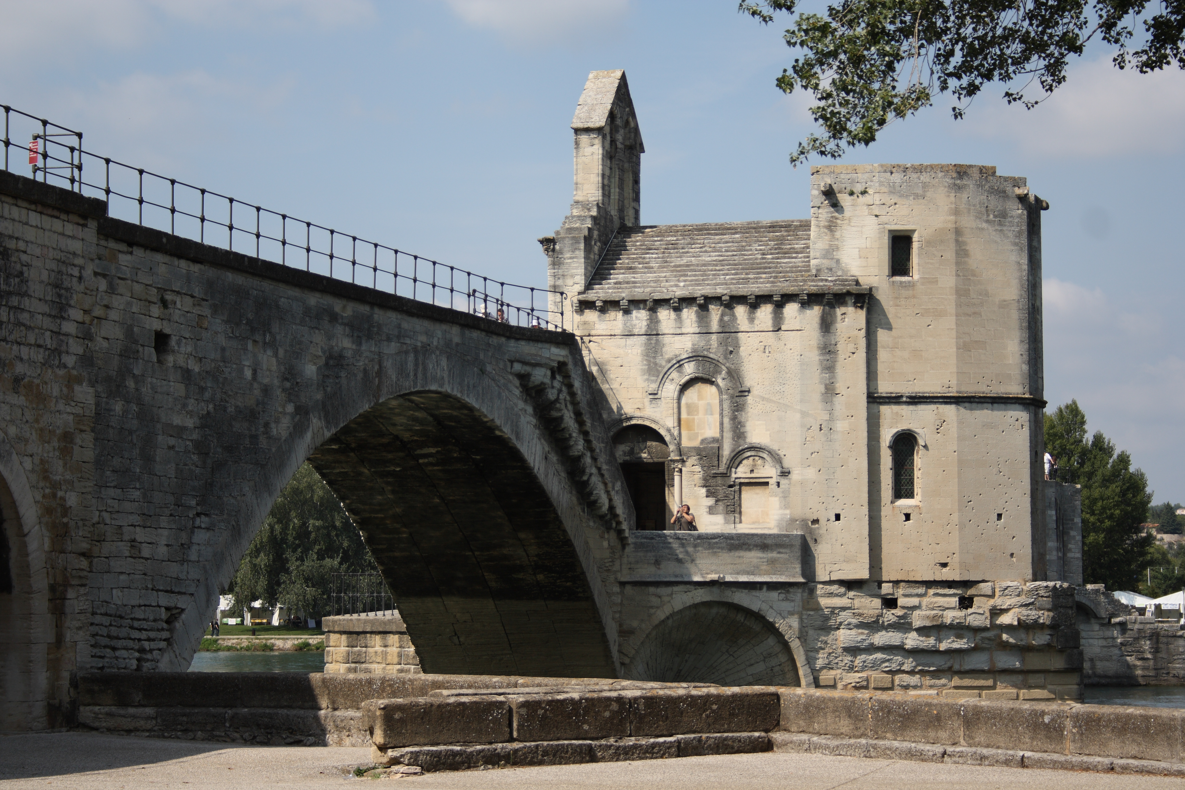 Kapelle Saint-Nicolas auf der Brücke Saint-Bénézet in Avignon